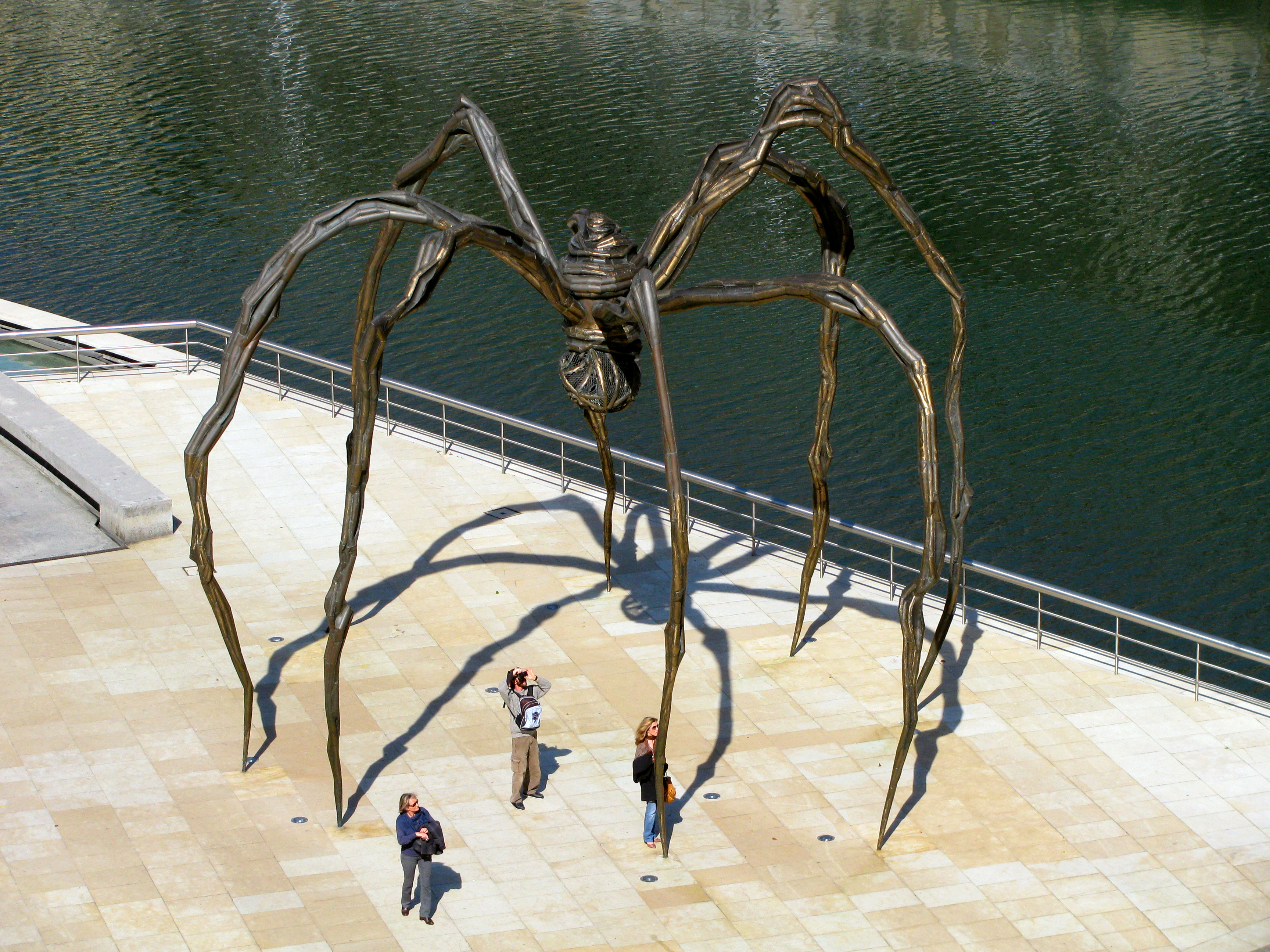 Скульптура паука в музее Гуггенхайма в Бильбао